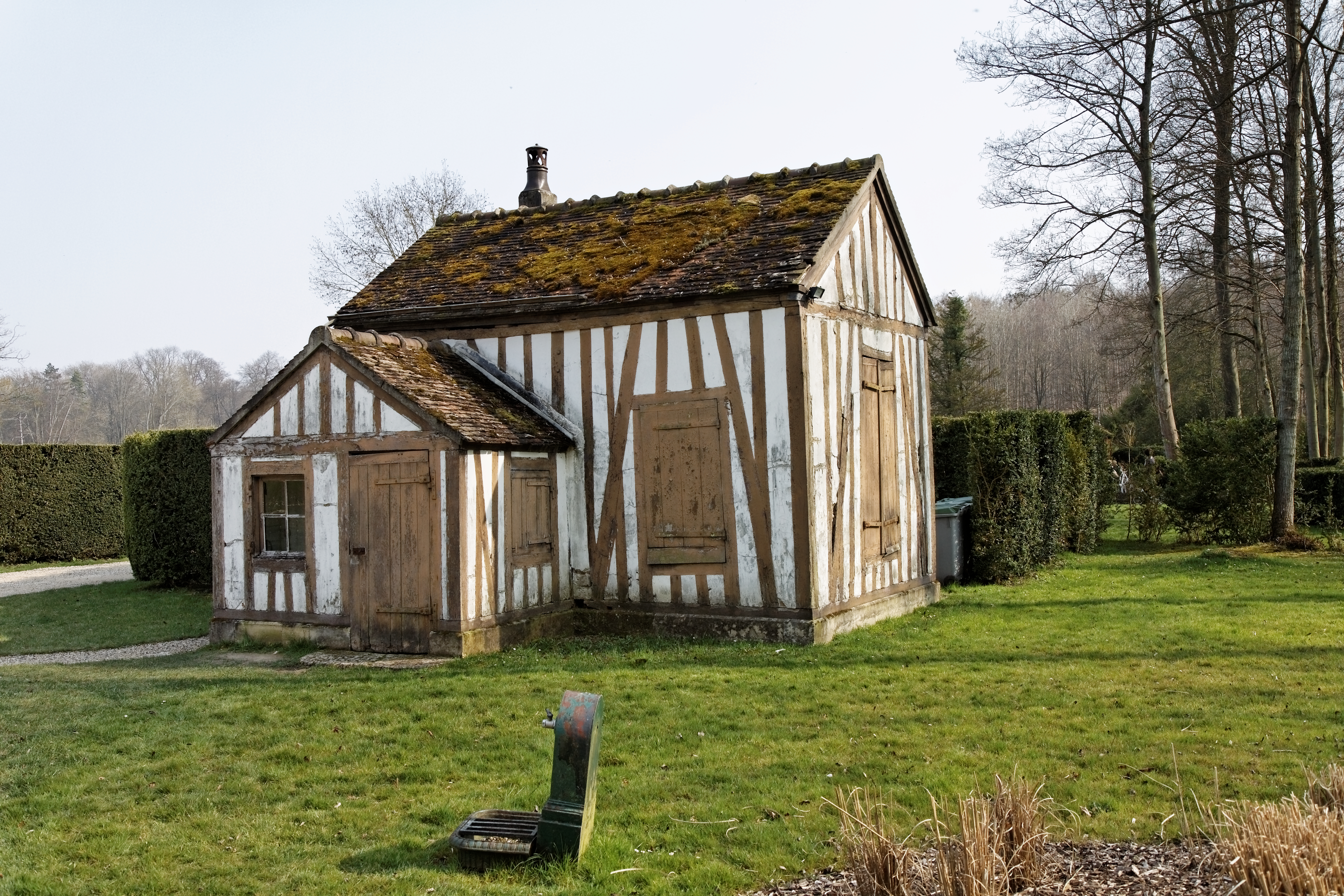 Le hameau du château de Chantilly.